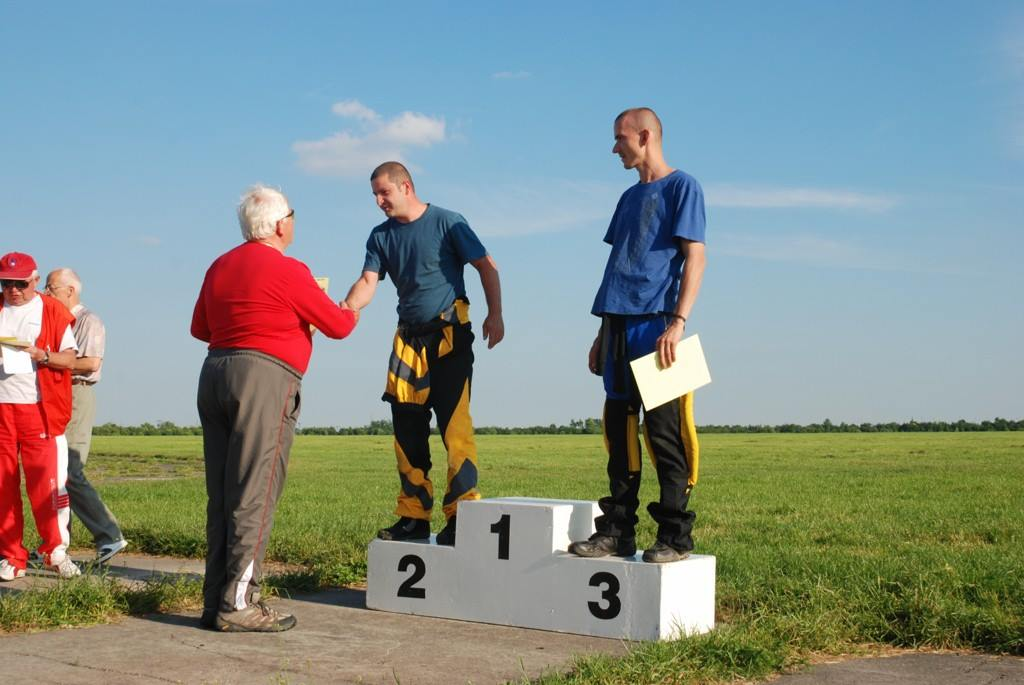 Spadochronowe Mistrzostwa Śląska 2011, dekoracja zwycięzców w kategorii „Spadochrony szkolne“: II miejsce – Wojciech Kielar, III miejsce – Rafał Duda. Składa gratulacje sędzia mistrzostw Vladislaw Horak, po lewo na drugim planie sędzia główny mistrzostw Ryszard Koczorowski, za nim Marian Brytan (Prezes O. ZPS w Katowicach) – Sekcja Spadochronowa Aeroklubu Gliwickiego